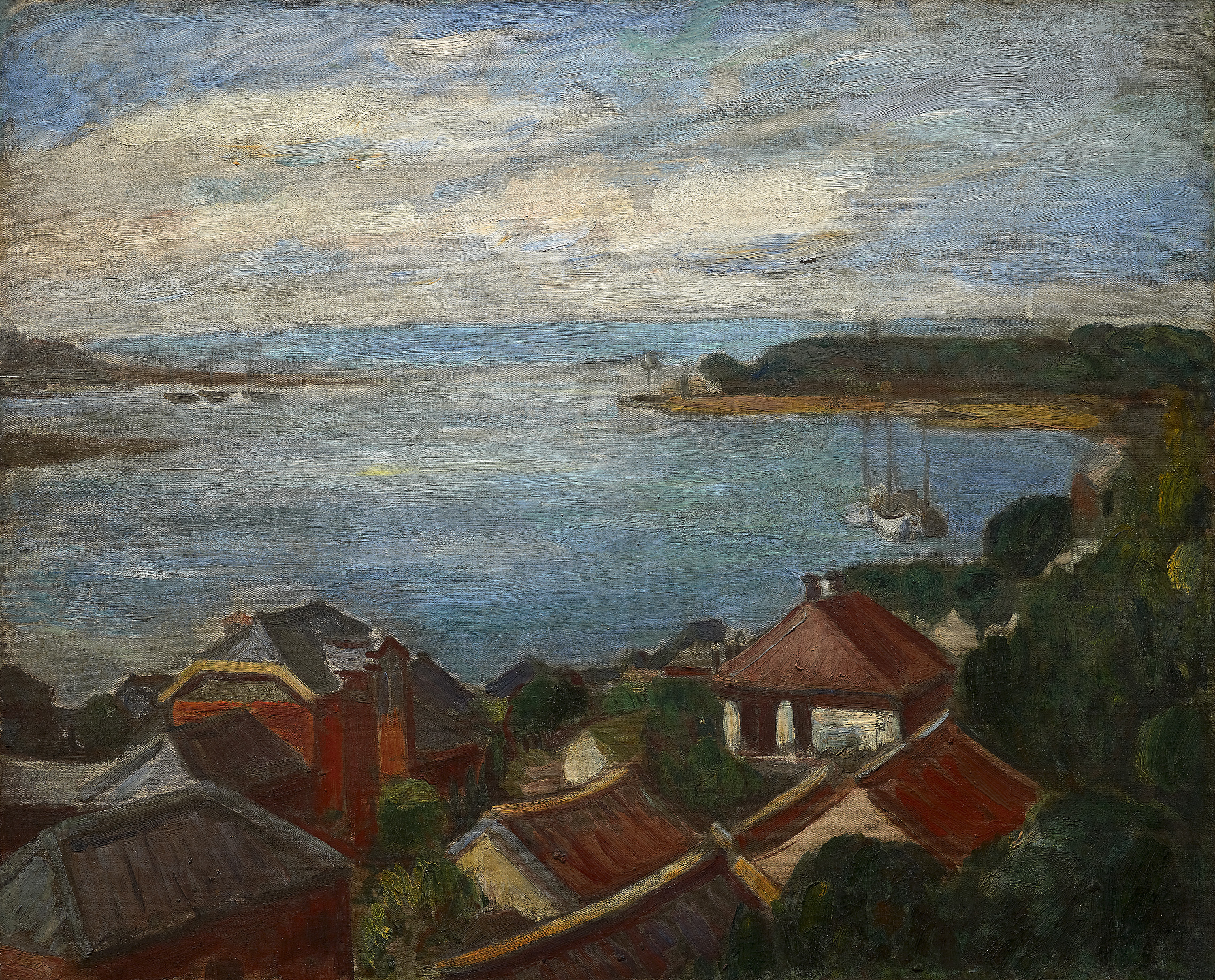 中文（台灣）: 李梅樹作品：淡水港，1930，油畫。 本圖以俯瞰角度描繪淡水，色彩變化細膩。畫面分為天空、淡水河與前景房子三個份量較重的部分，中間採傳統學院技法，調子較高。